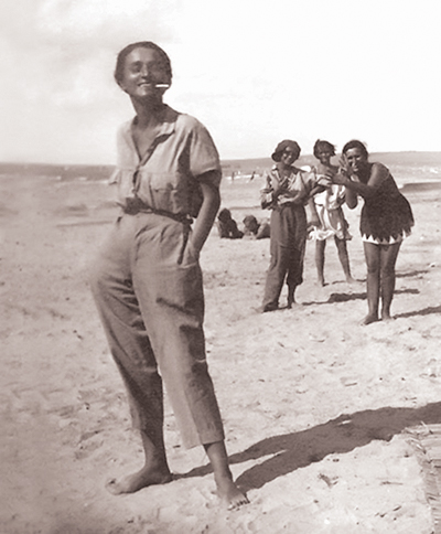 Elene Dariani-Bakradze, Georgian poetess